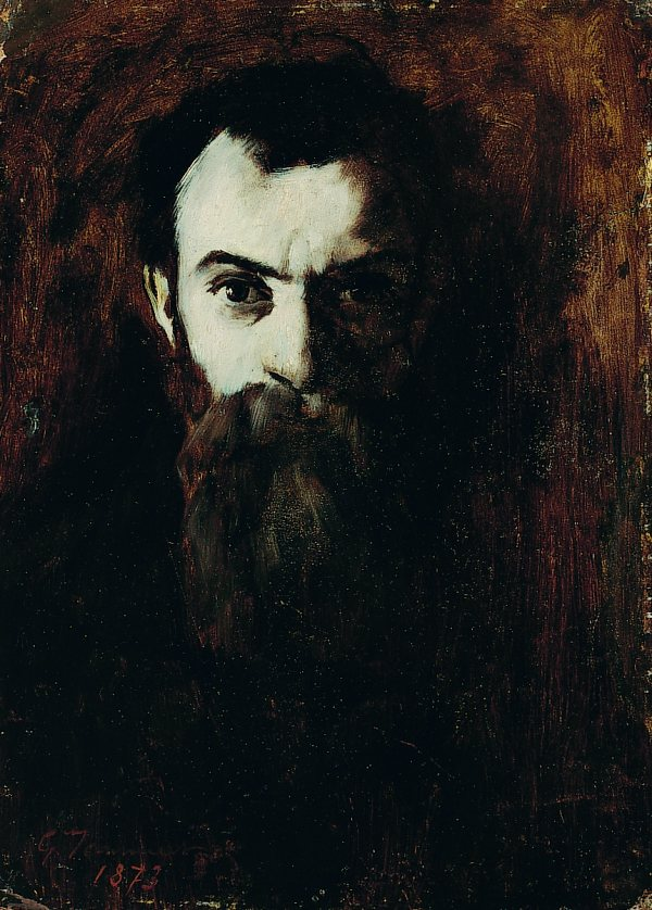 Autoportrait